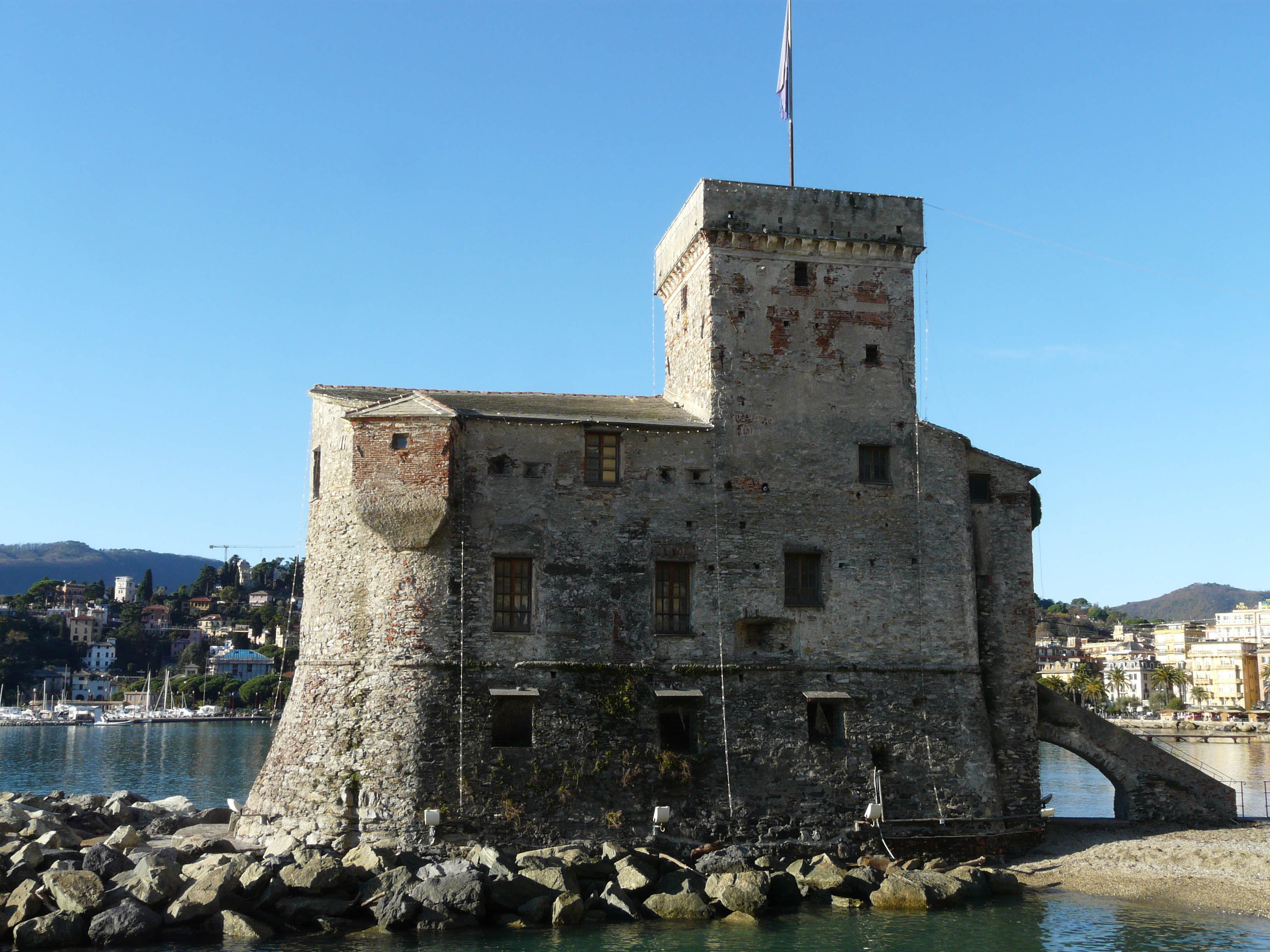 Vista laterale del castello di Rapallo, Liguria, Italia